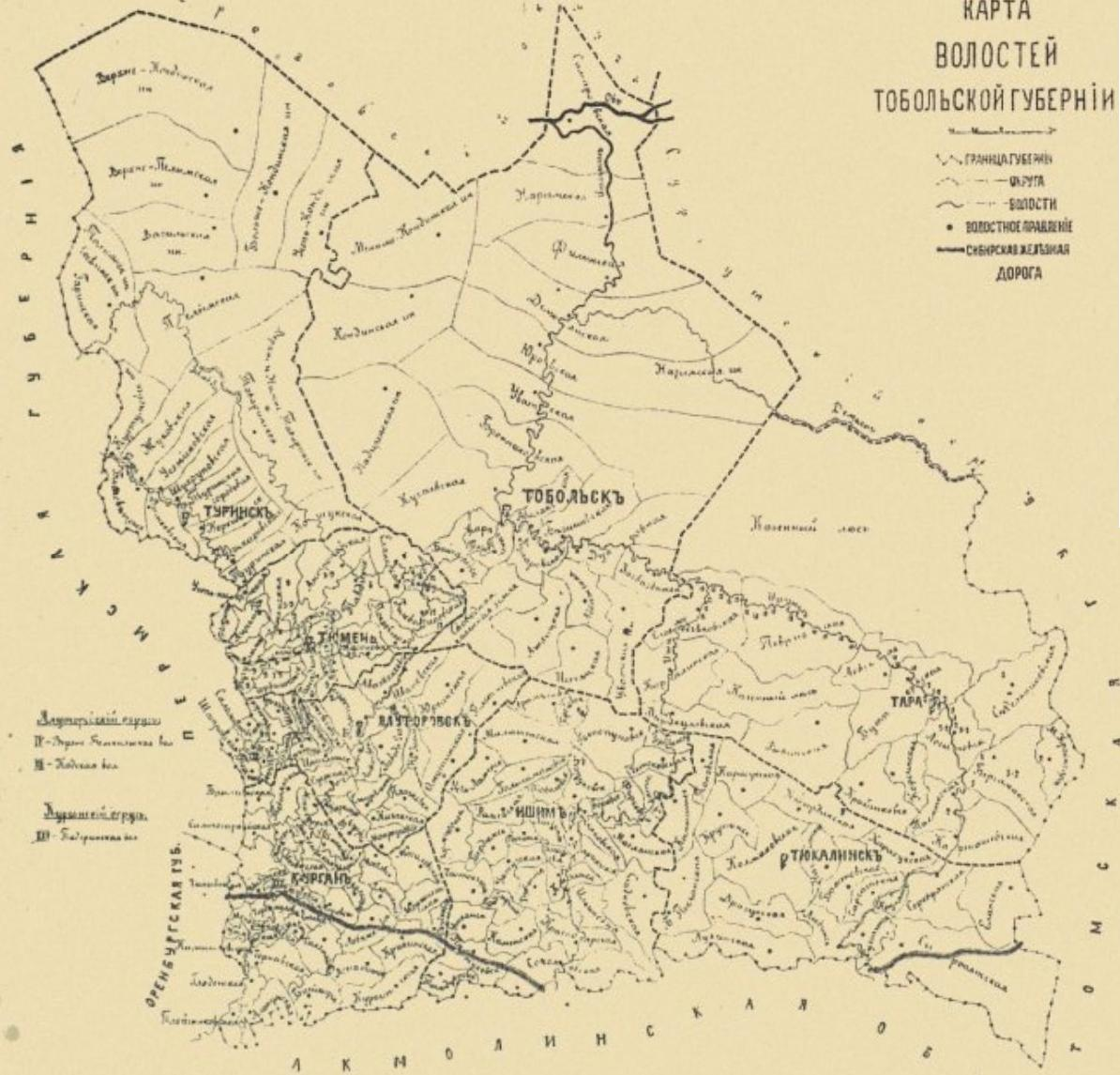 Состав Тобольской губернии на 1893 год. Изображение взято из издания Волости и населённые места 1893 года: Тобольская губерния; Выпуск 10; Издание Центрального Статистического Комитета Министерства Внутренних Дел; г. Санкт-Петербург; 1894.